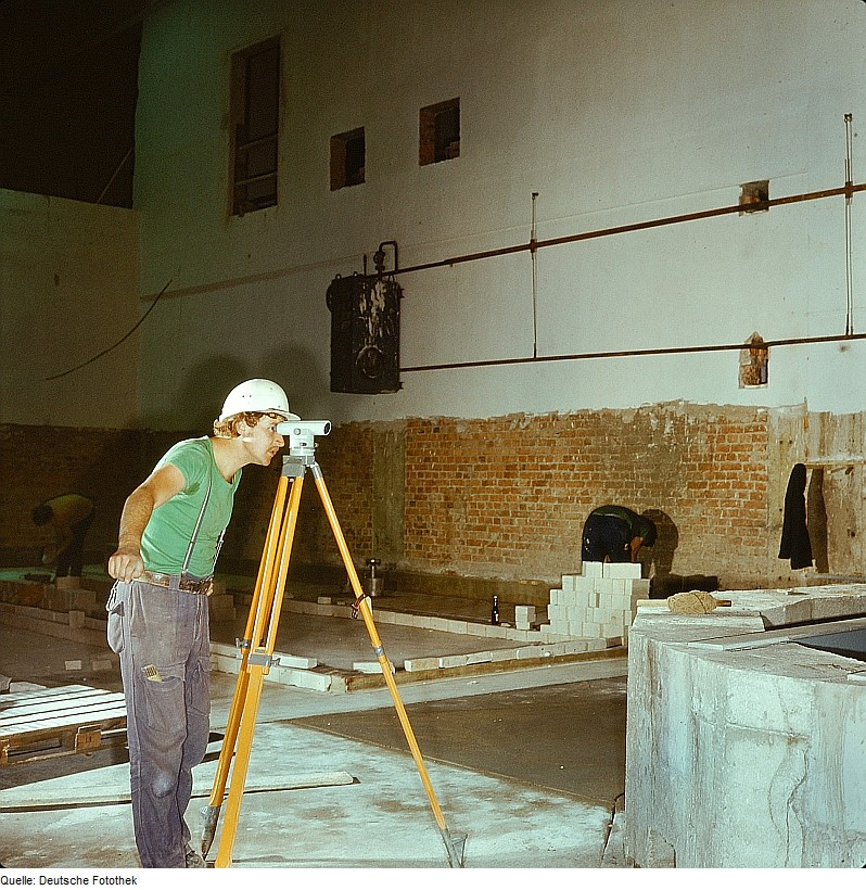 Original image description from the Deutsche FotothekVermessungsfacharbeiter, Lagerhalle